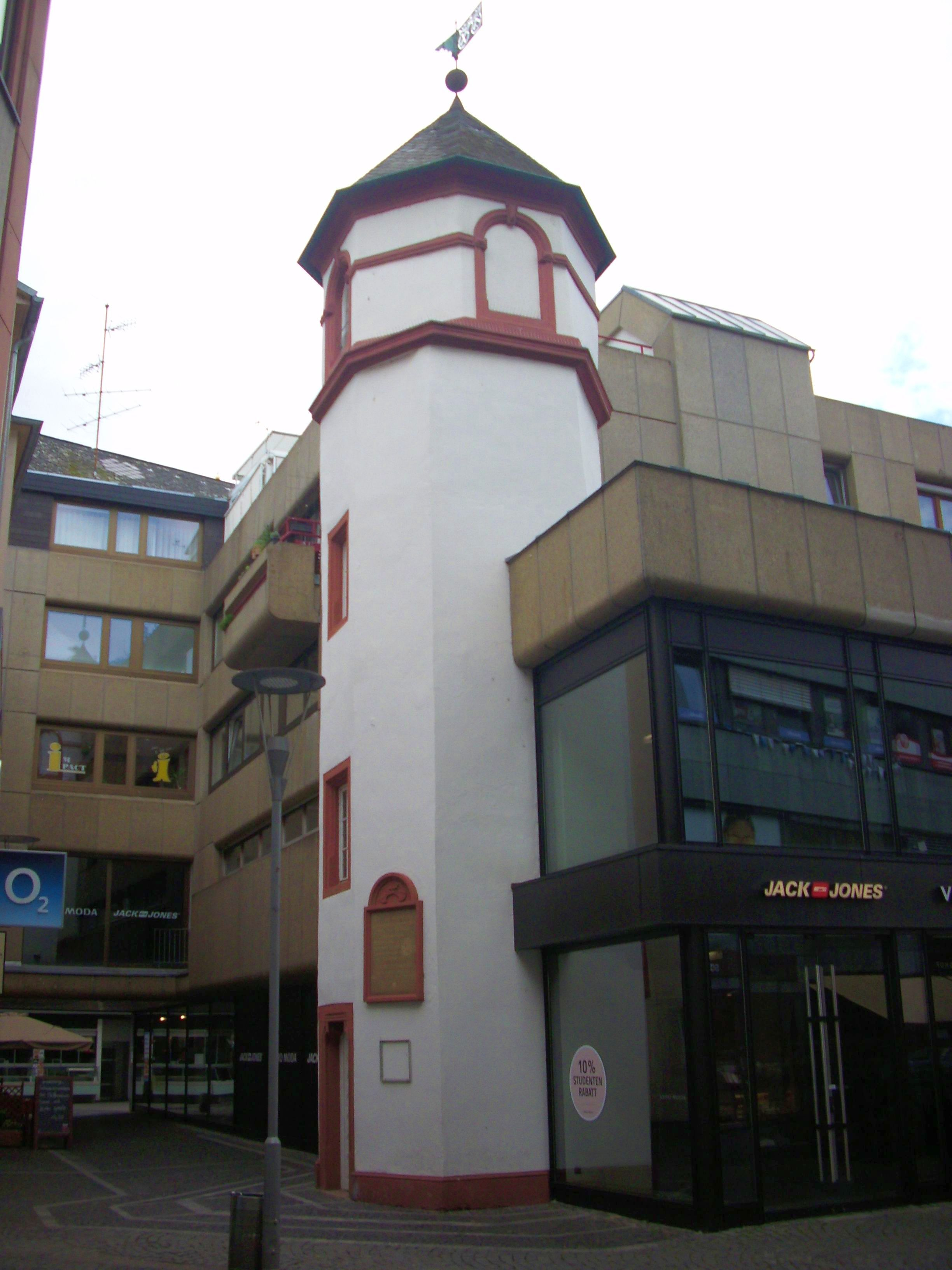 Oktogonaler Renaissance-Turm des Humbrechthofs, bezeichnet 1584, Obergeschoss 19. Jahrhundert